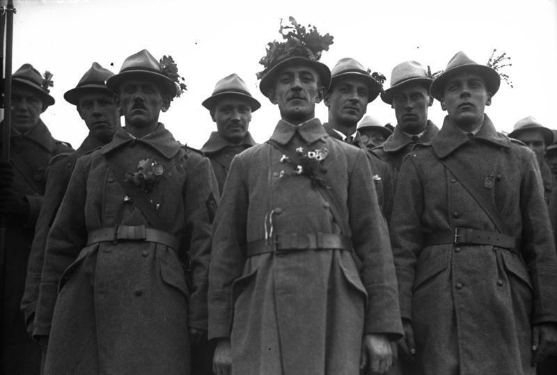 Oesterreichische Heimwehr.